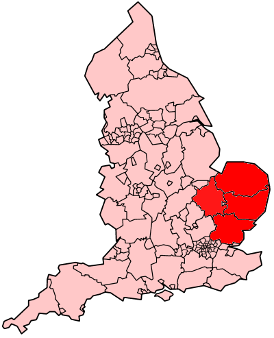 Karte Englands, Ostanglien markiert